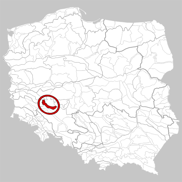 Physico-geographical regionalization of Poland Mezoregion 318.44 Trzebnica Hills Regionalizacja fizycznogeograficzna Polski Mezoregion 318.44 Wzgórza Trzebnickie